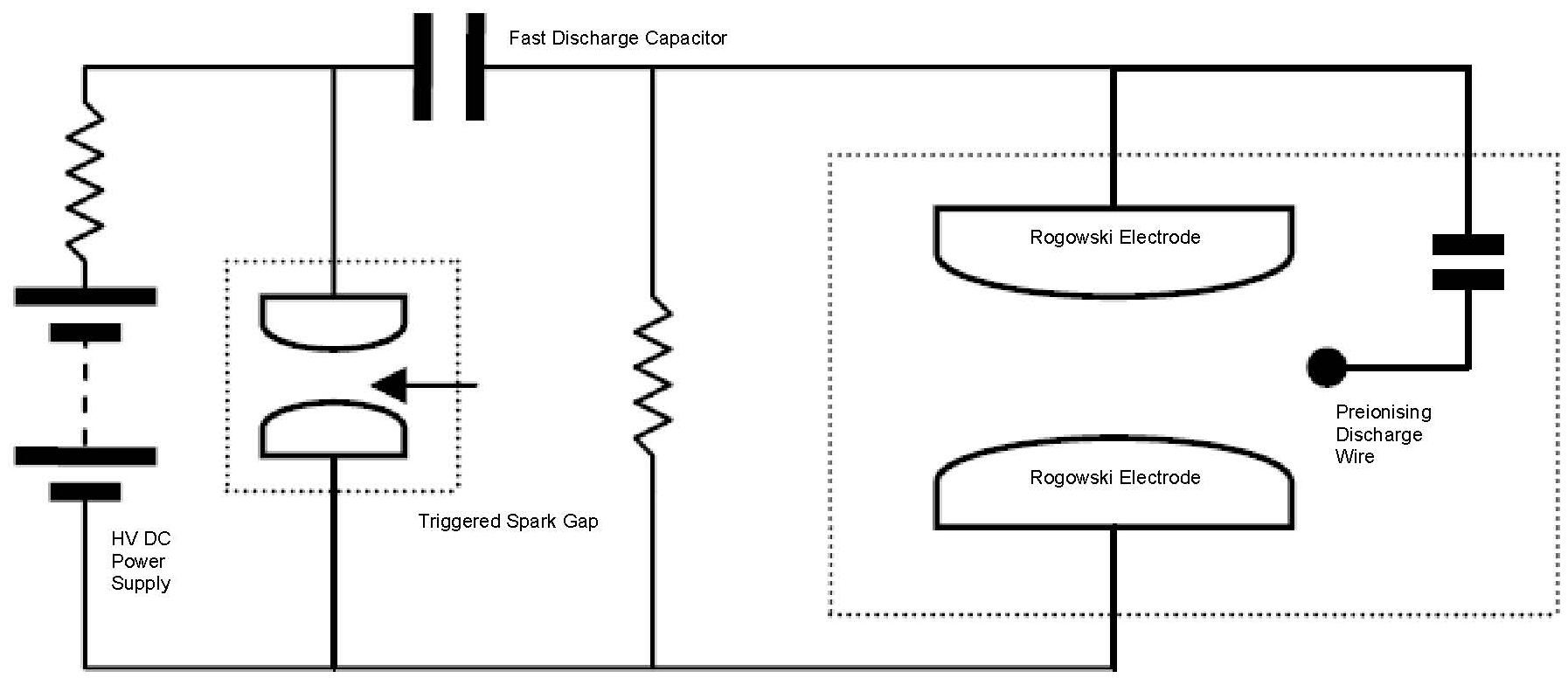 CO2 TEA Laser Electrical Circuit